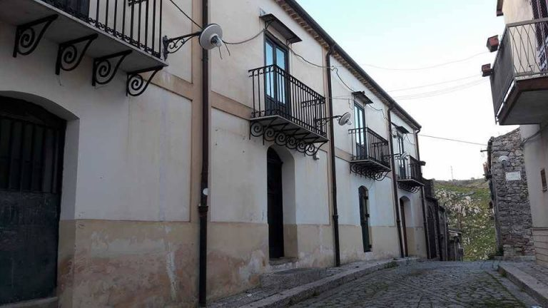 Palazzo Musacchia, sede della biblioteca comunale a Santa Cristina Gela (PA).